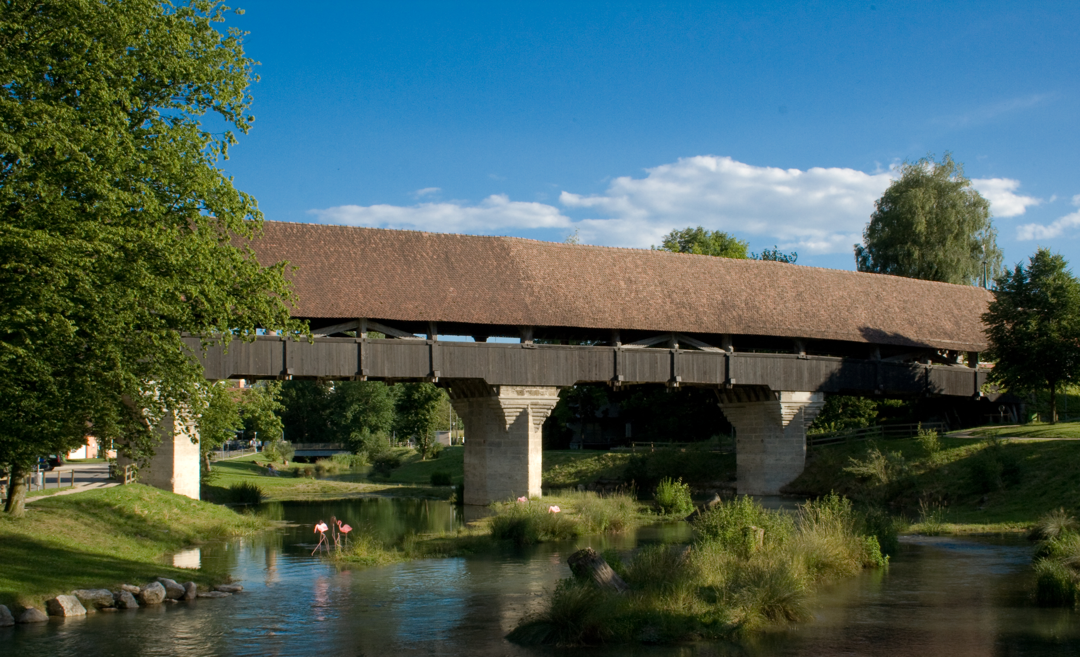 Pont couvert sur l'ancien cours de l'Aar à Aarberg, Suisse.